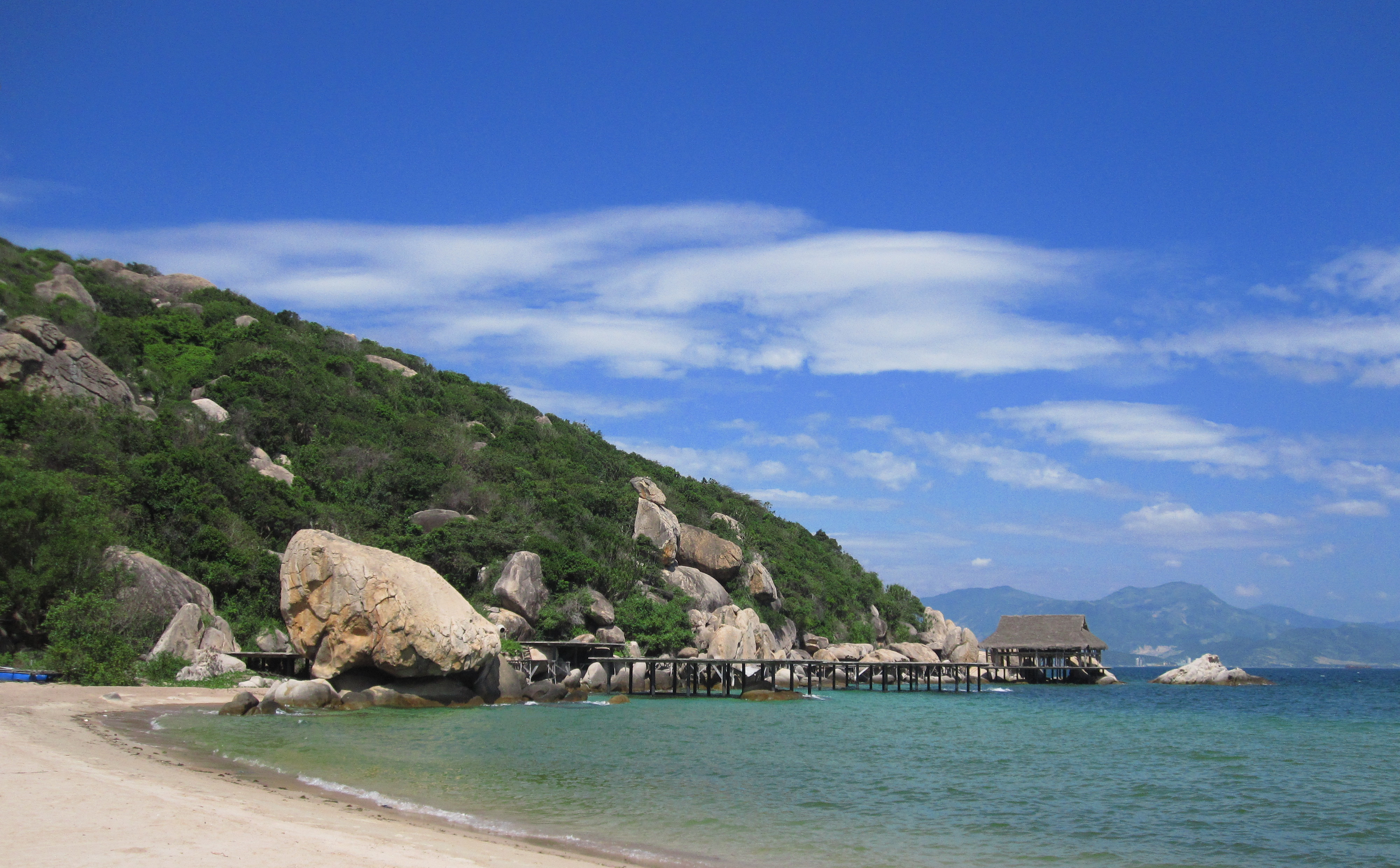 NGOC SUONG RESORT,CAM RANH,KHANH HOA